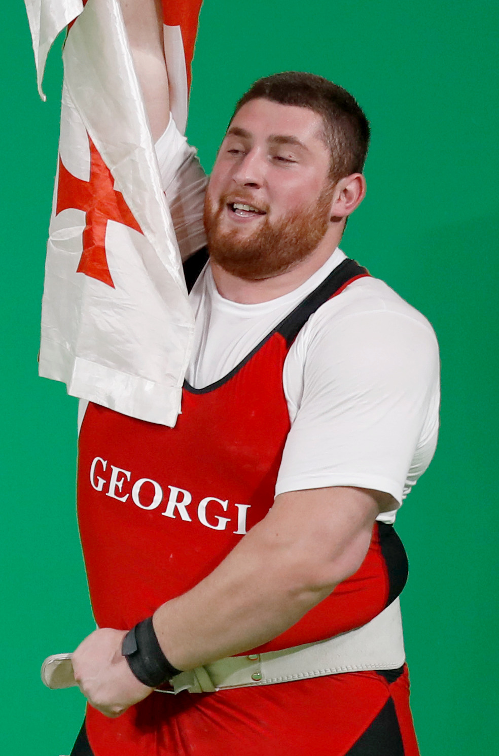 Rio de Janeiro - O georgiano Lasha Talakhadze bate o recorde mundial e leva ouro no levantamento de peso com 473kg ( Fernando Frazão/Agência Brasil)